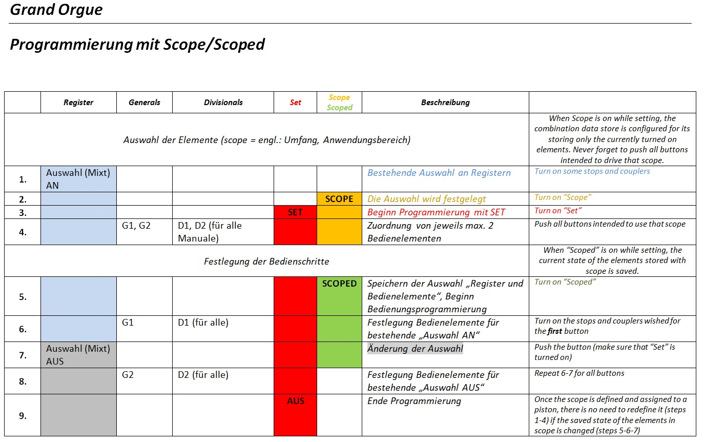 Software GrandOrgue, Erklärung der Funktion scope/scoped